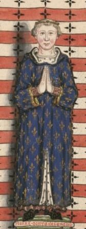 Pierre Ier d'Alençon